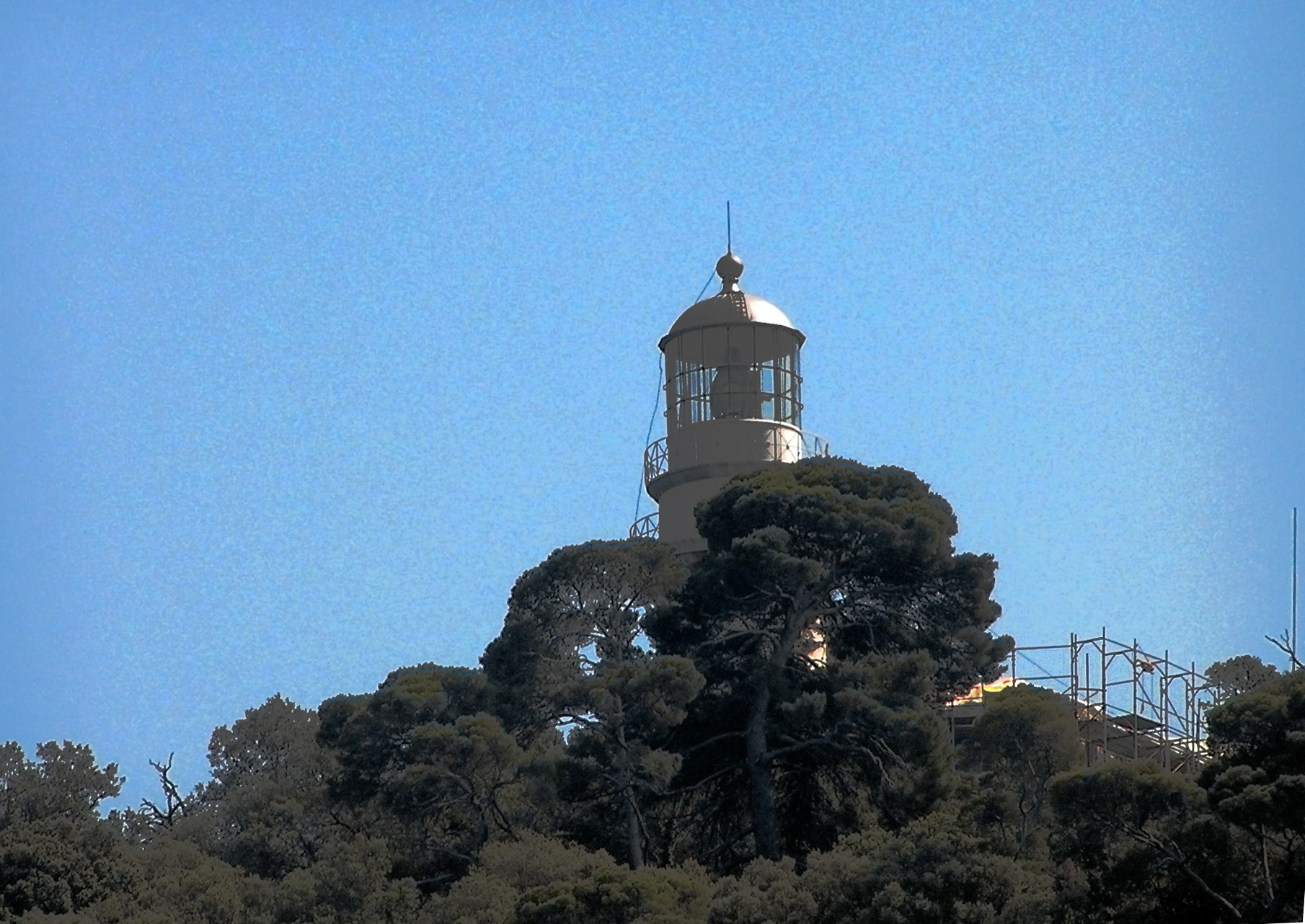 Faro dell'isola del Tino, Porto Venere, Liguria, Italy